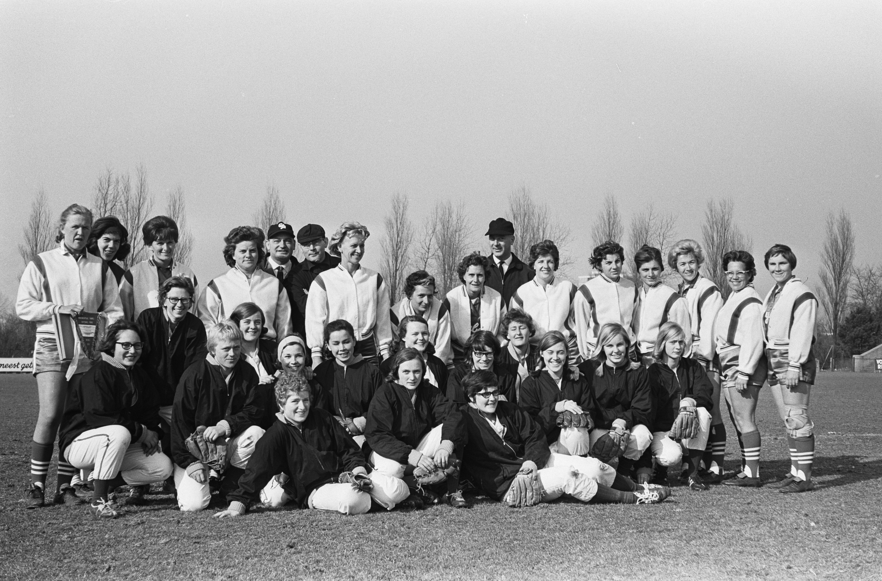 Collectie / Archief : Fotocollectie Anefo Reportage / Serie : [ onbekend ] Beschrijving : Dames softbal Nederland tegen de Raybostos Brakketts (Amerikaanse dames), de beide teams Datum : 14 maart 1965 Trefwoorden : softbal, teams Instellingsnaam : Raybostos Brakketts Fotograaf : Kroon, Ron / Anefo Auteursrechthebbende : Nationaal Archief Materiaalsoort : Negatief (zwart/wit) Nummer archiefinventaris : bekijk toegang 2.24.01.05 Bestanddeelnummer : 917-5385